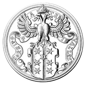 Siegel des Kanton Wallis von 1582